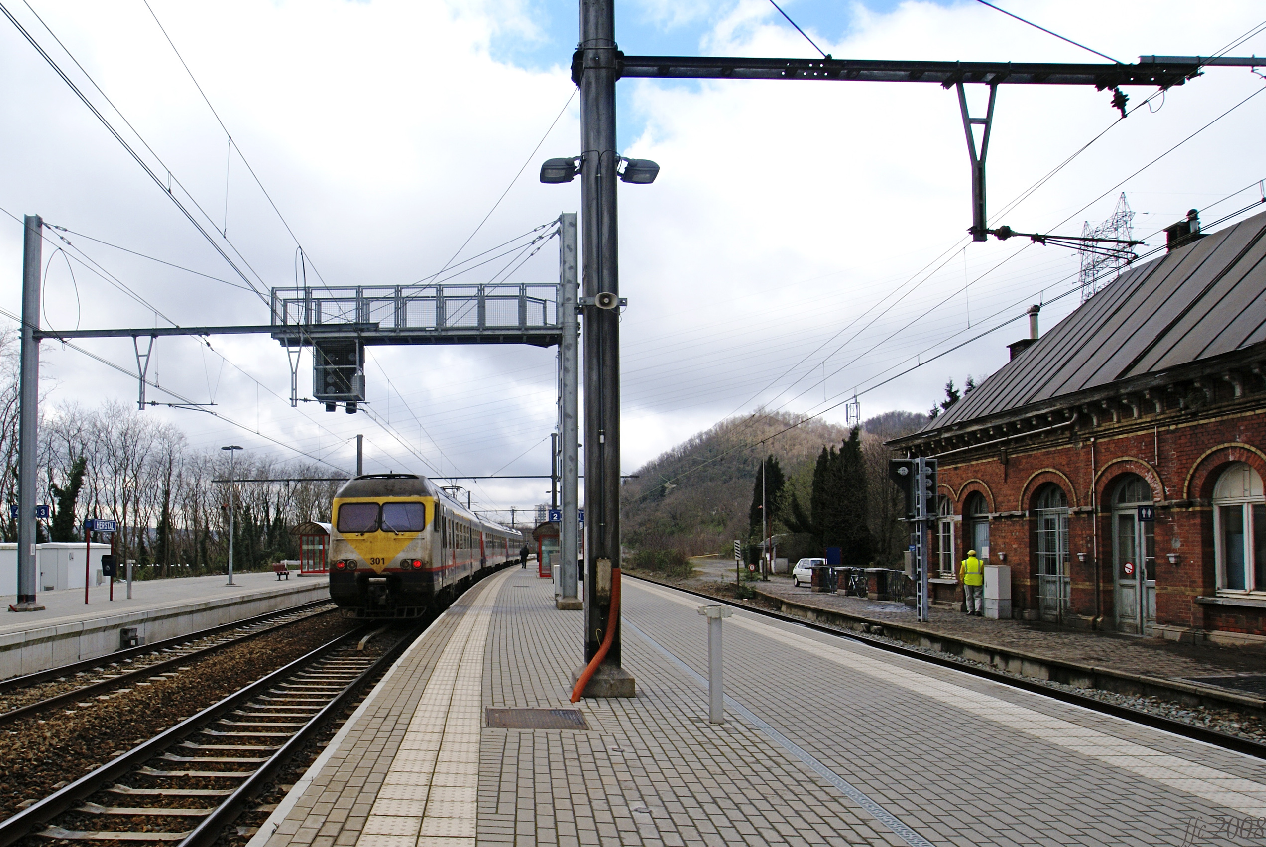 Herstal (Belgium) Railway station Train 301 departing for Liège Estació, tren 301 part per a Lieja Le train 301 à destination de Liège Trein 301 vertrekt richting Luik